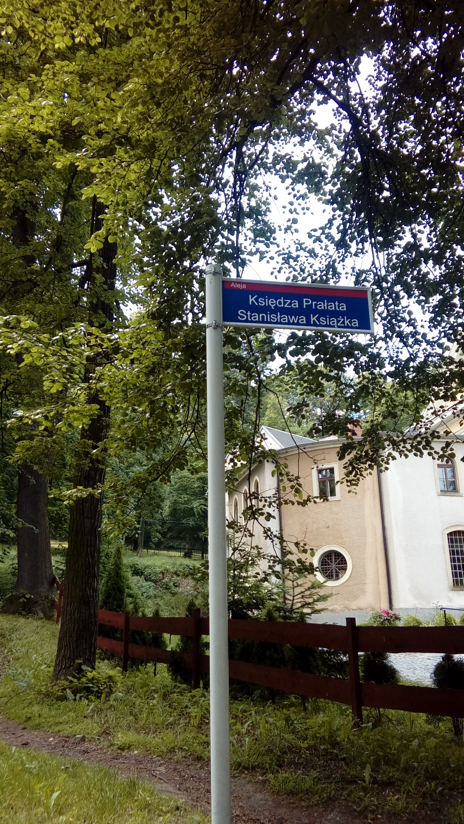 Kamienna Góra, tablica ulicowa Alei Księdza Prałata Stanisława Książka